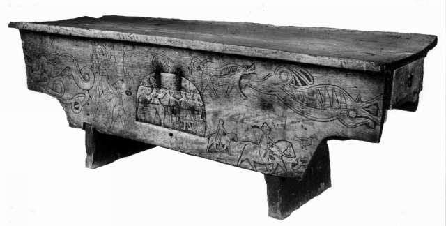 Kistebord fra Høydalsmo, Tokke i Telemark. Ved en radiologisk datering er bordet anslått å være laget en gang mellom 1435 og 1455. Lengde 228 cm. Norsk Folkemuseum, NF.1906-1056.